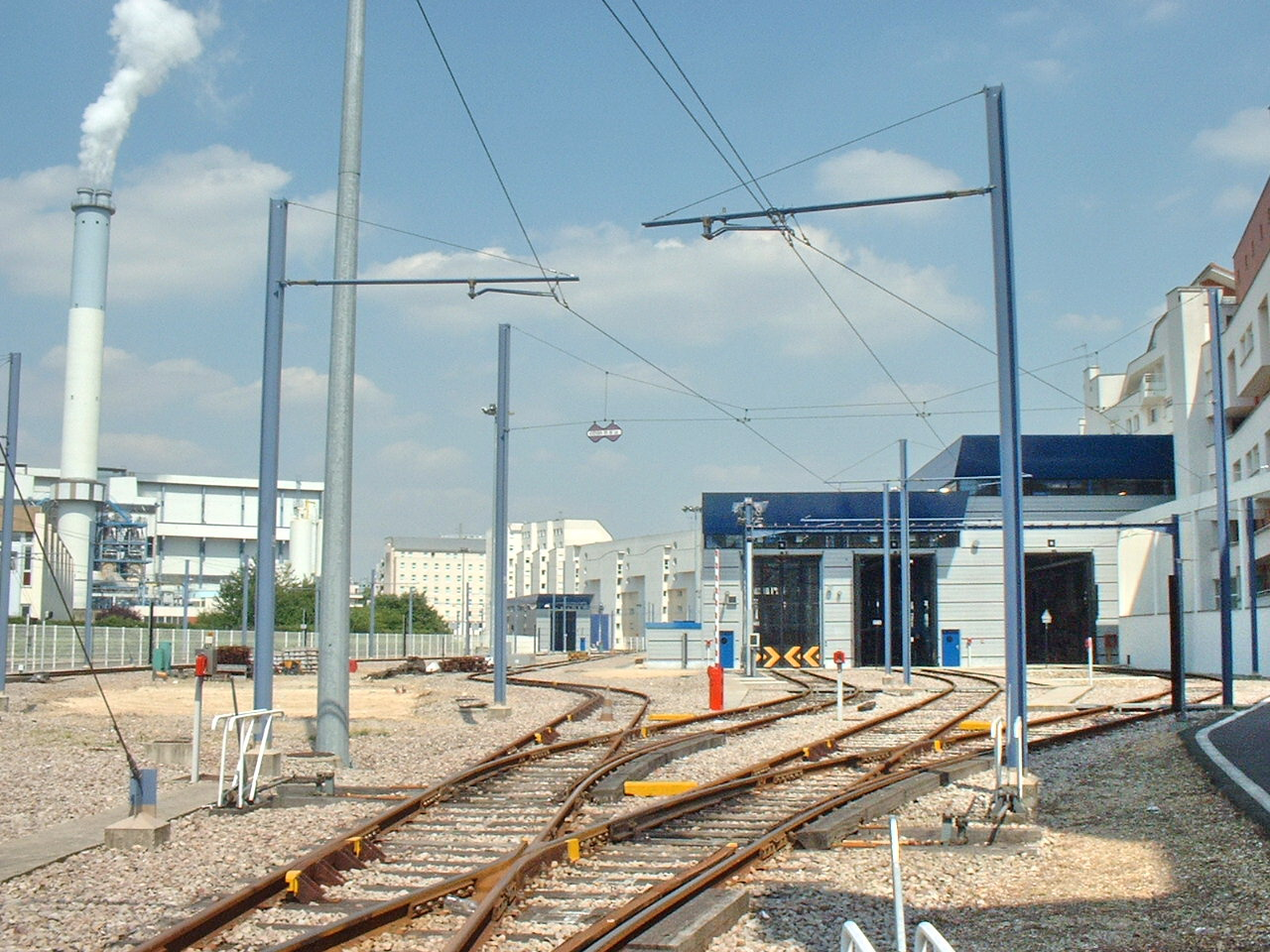 Site de maintenance et de remisage de la Ligne 2 du tramway d'Île-de-France à Issy-les-Moulineaux (Hauts-de-Seine - France) - A l'extrème gauche, l'usine d'incinération des ordures ménagères TIRU.